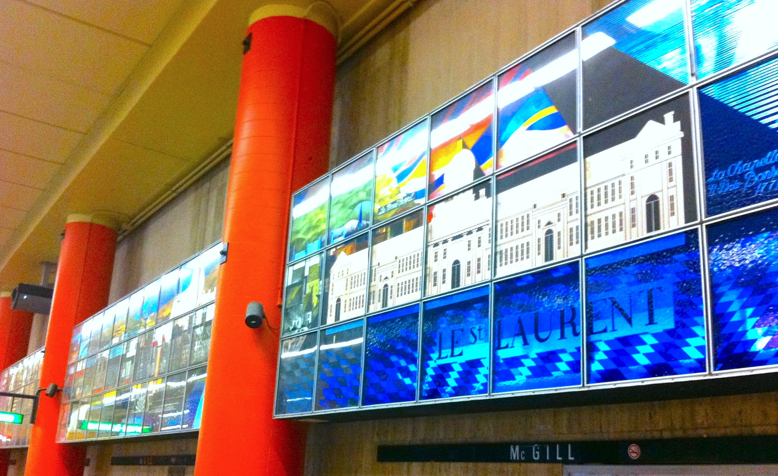 Nicolas Sollogoub, La vie à Montréal au XIXe siècle, 1974. Verre peint, cinq verrières, 30,5m x 1,8m total. Station de métro McGill (quai Honoré-Beaugrand), Montréal.